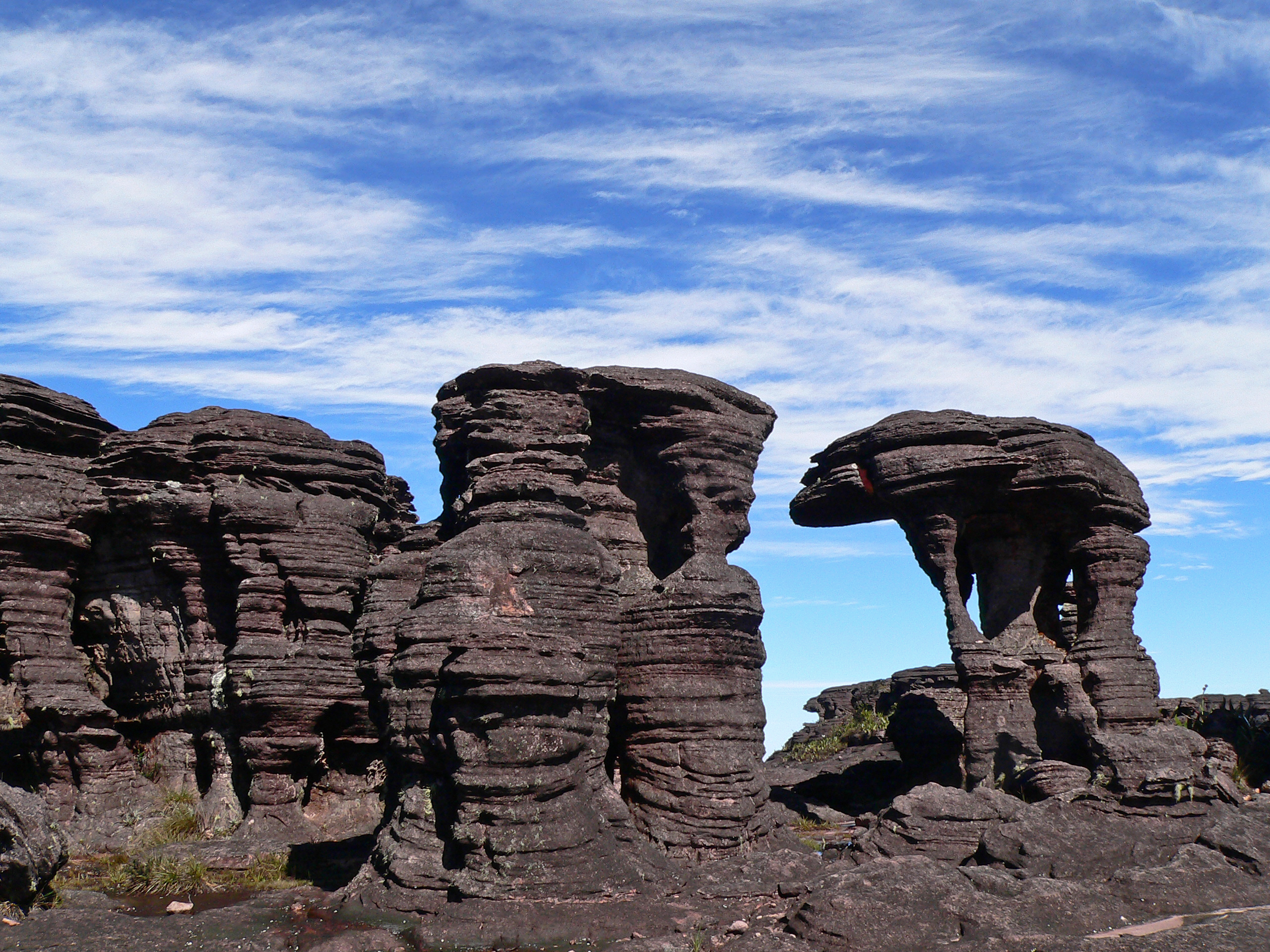 formação rochosa na para superior do monte roraima